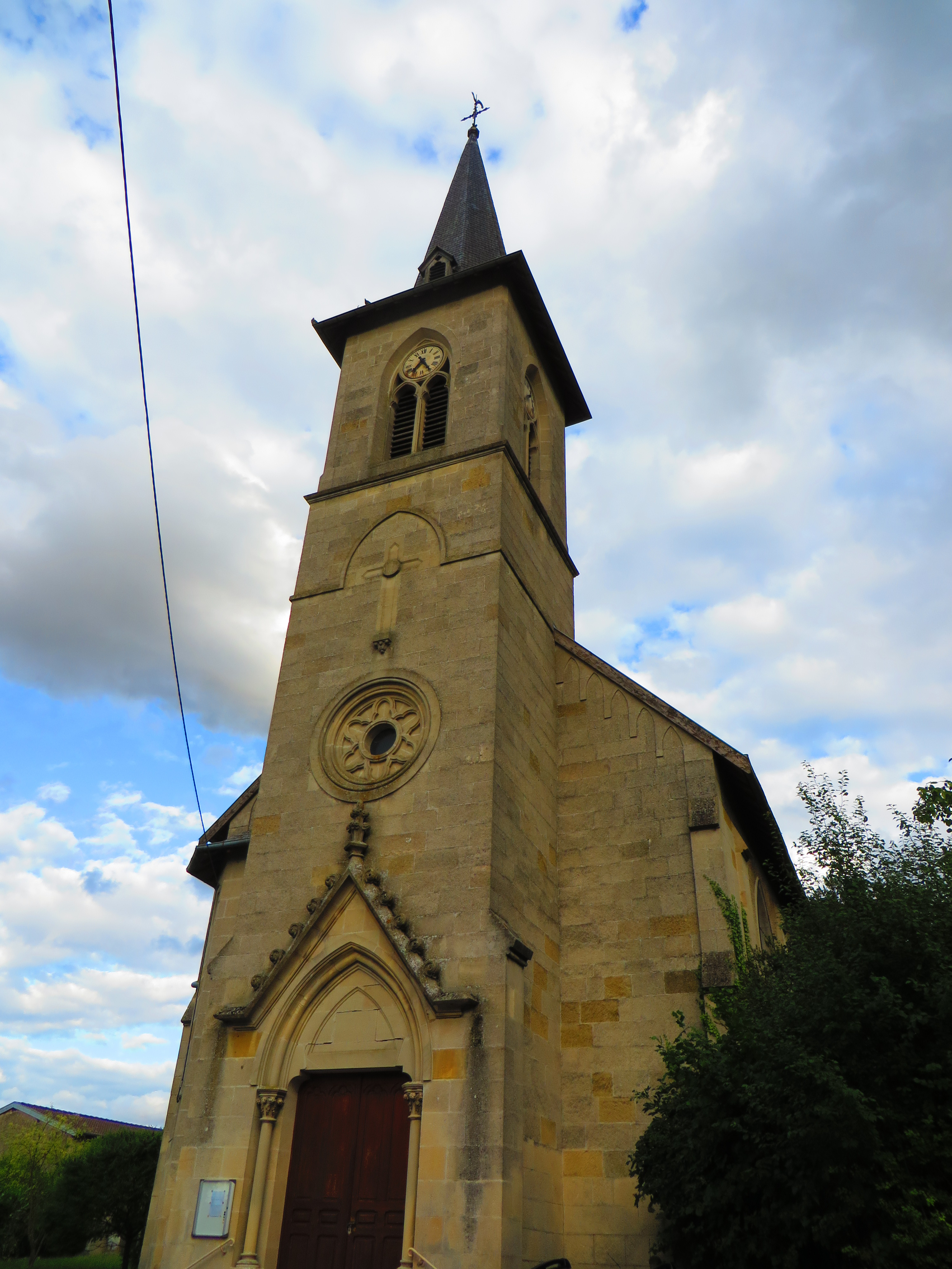 Thillot L'église Saint-Abdon